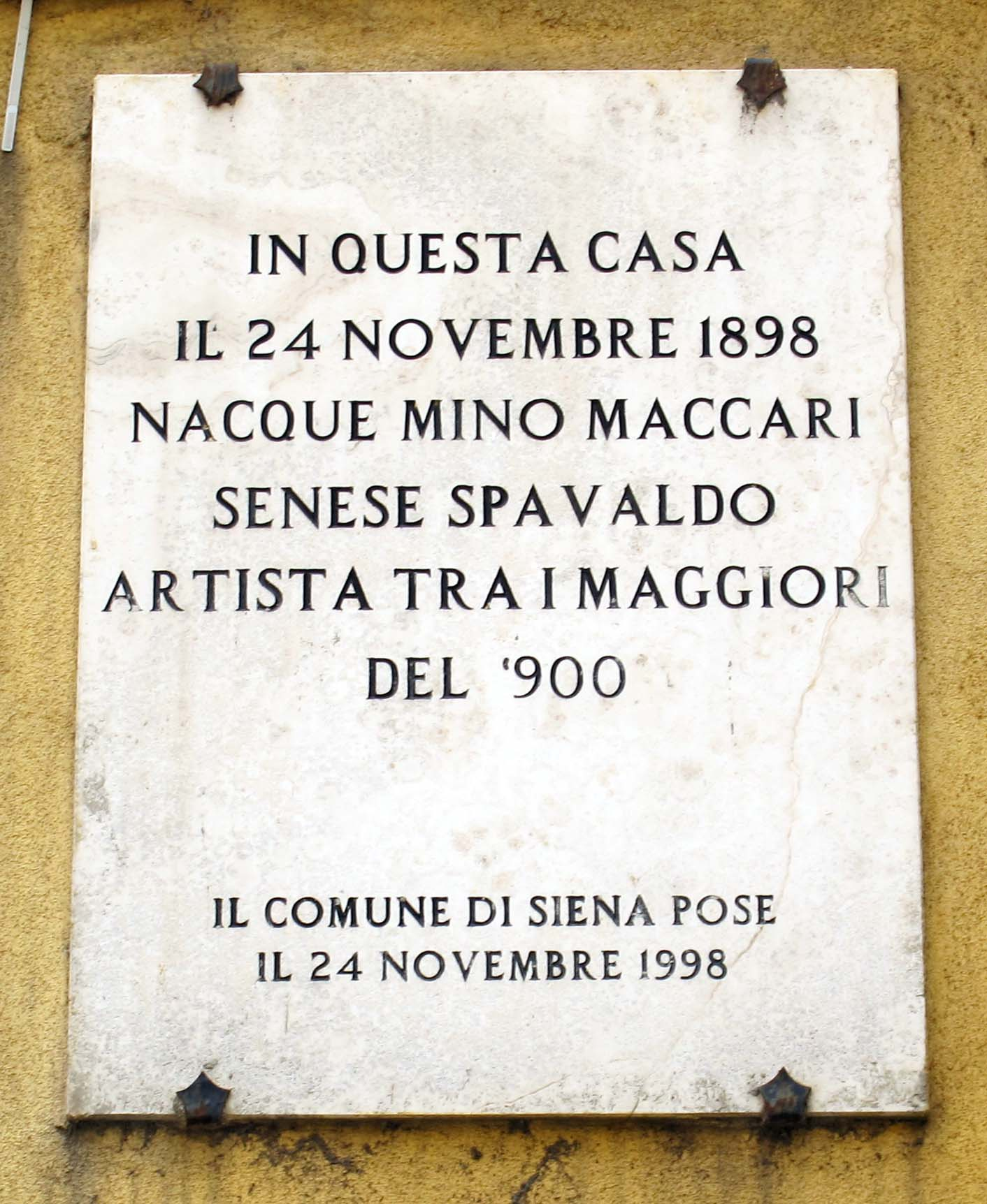 Via di Salicotto e dintorni, Siena